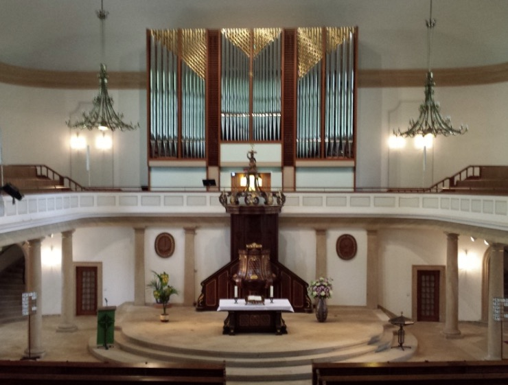 Neue Orgel der Pauluskirche Bad Kreuznach